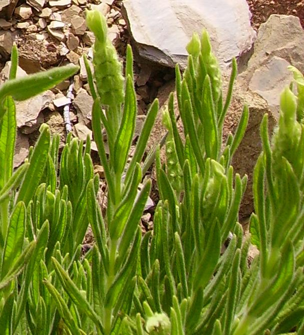 Lavandula viridis Detalle de una foto de Lavandula viridis en El Andévalo (Huelva) tomada por Alejandro Ibáñez, el 19/03/07 con cámara PENTAX Optio 50L. No incluyo la foto entera porque está desenfocada.